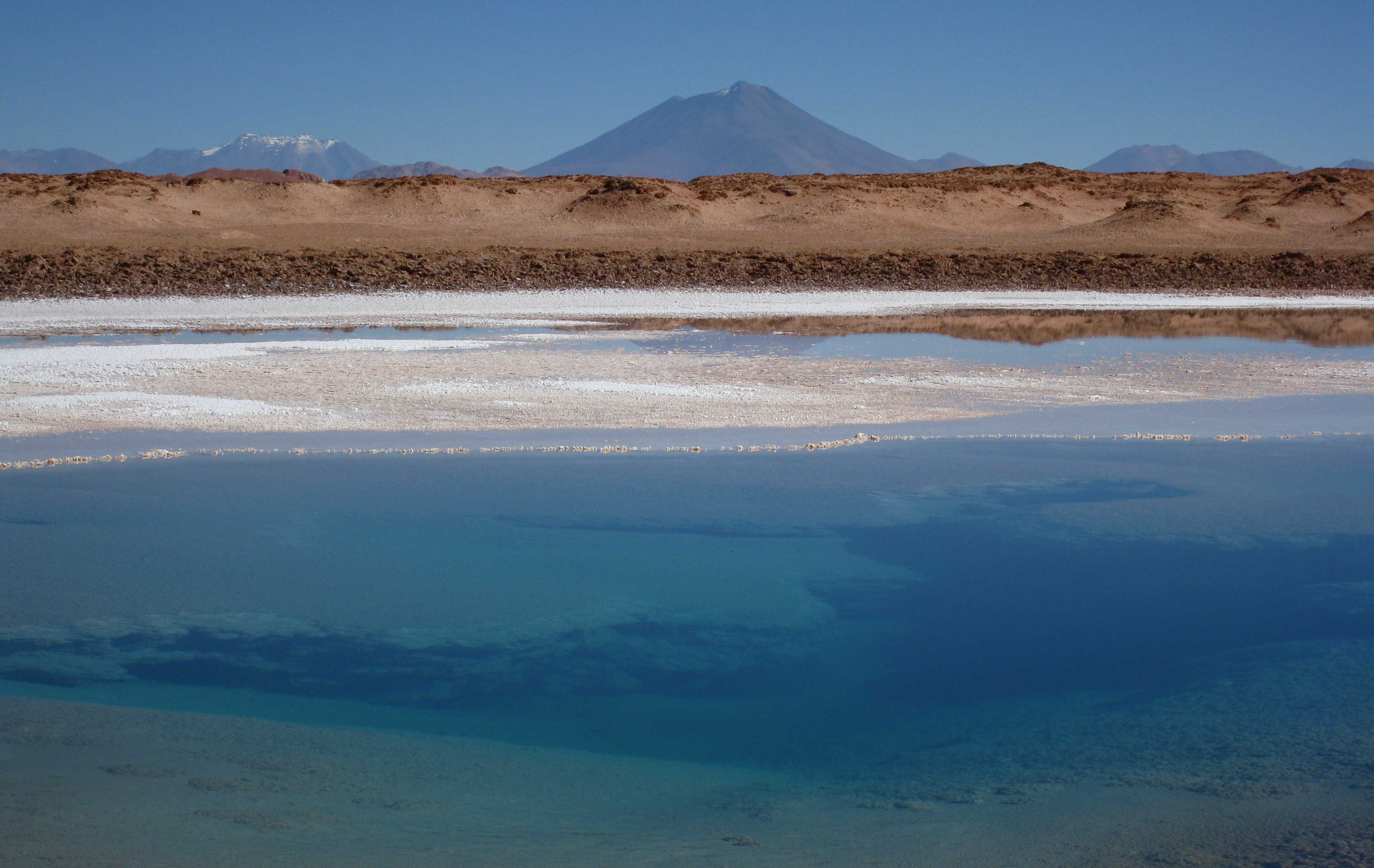 Ojo del mar and Aracar volcano, Argentina.